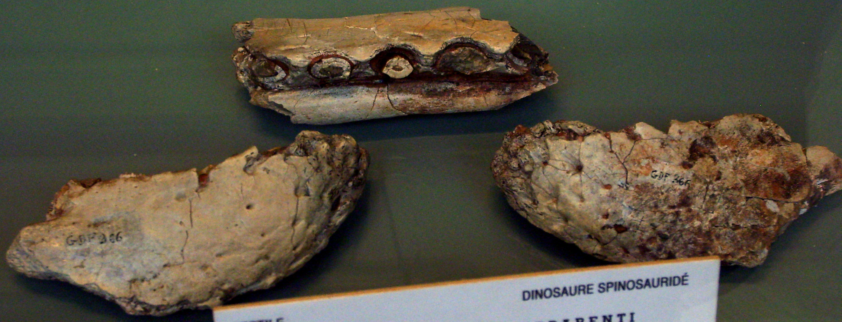 Cristatusaurus lapparenti (holotype, MNHN GDF 366) jaw fossils, Muséum national d'Histoire naturelle, Paris.